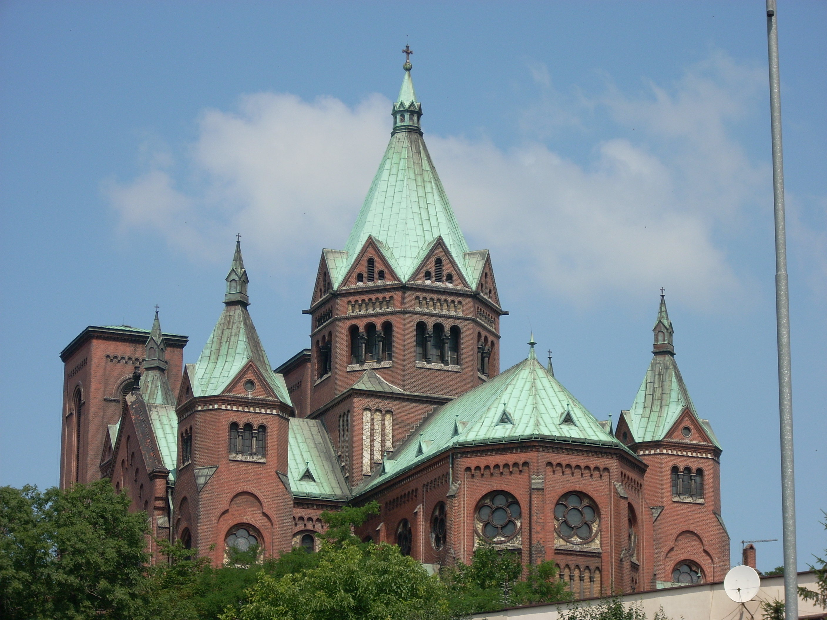 Kościół pw. św. Stanisława BM, wybudowany w latach 1904 - 1913.